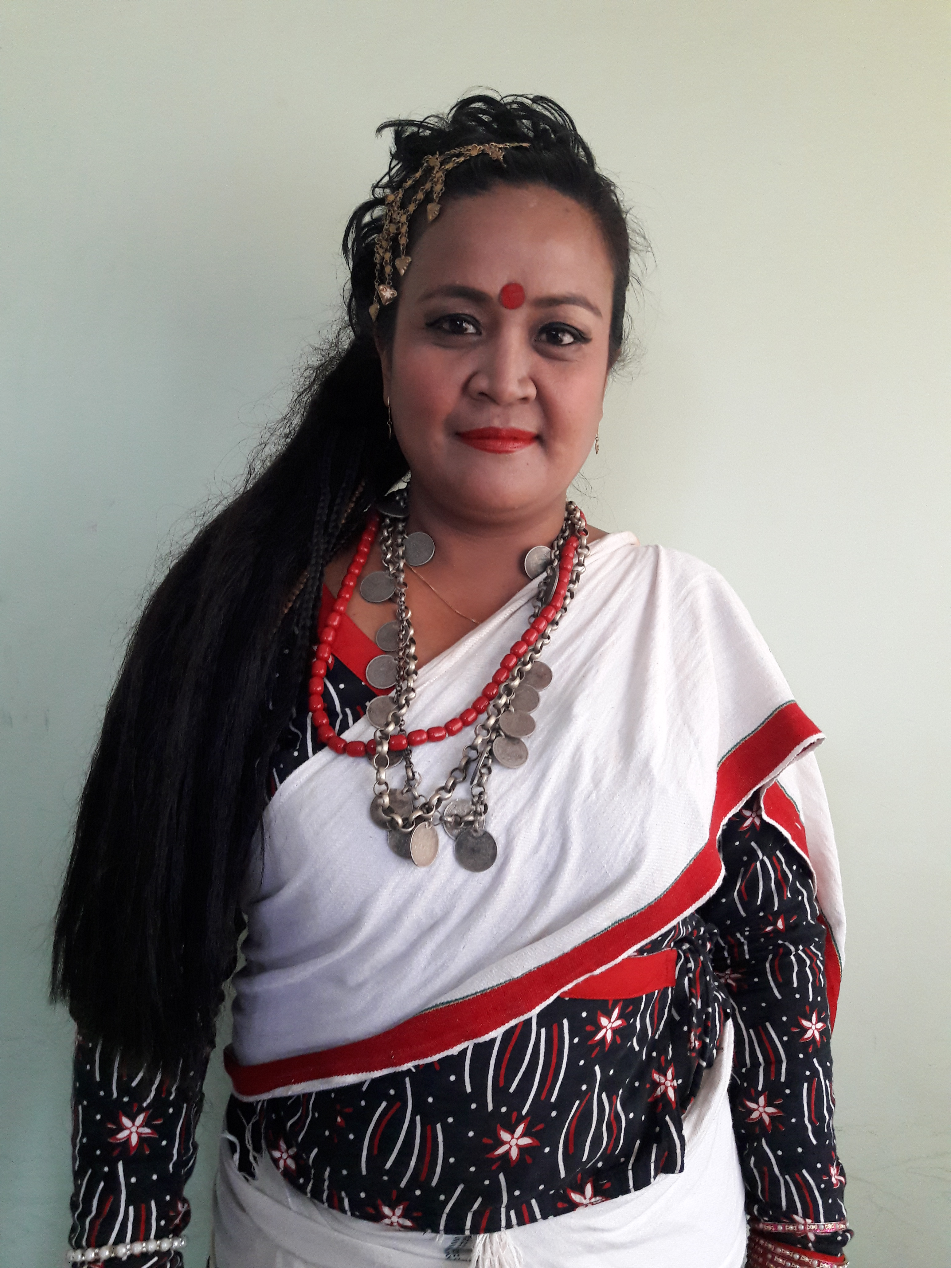 नेपाल भाषा: Palpasa Dangol, Nepal